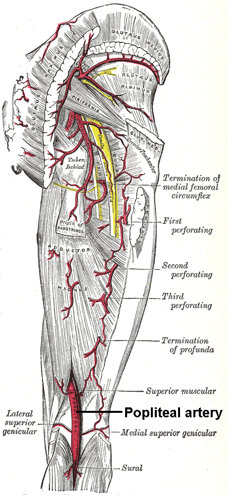 dorsal view